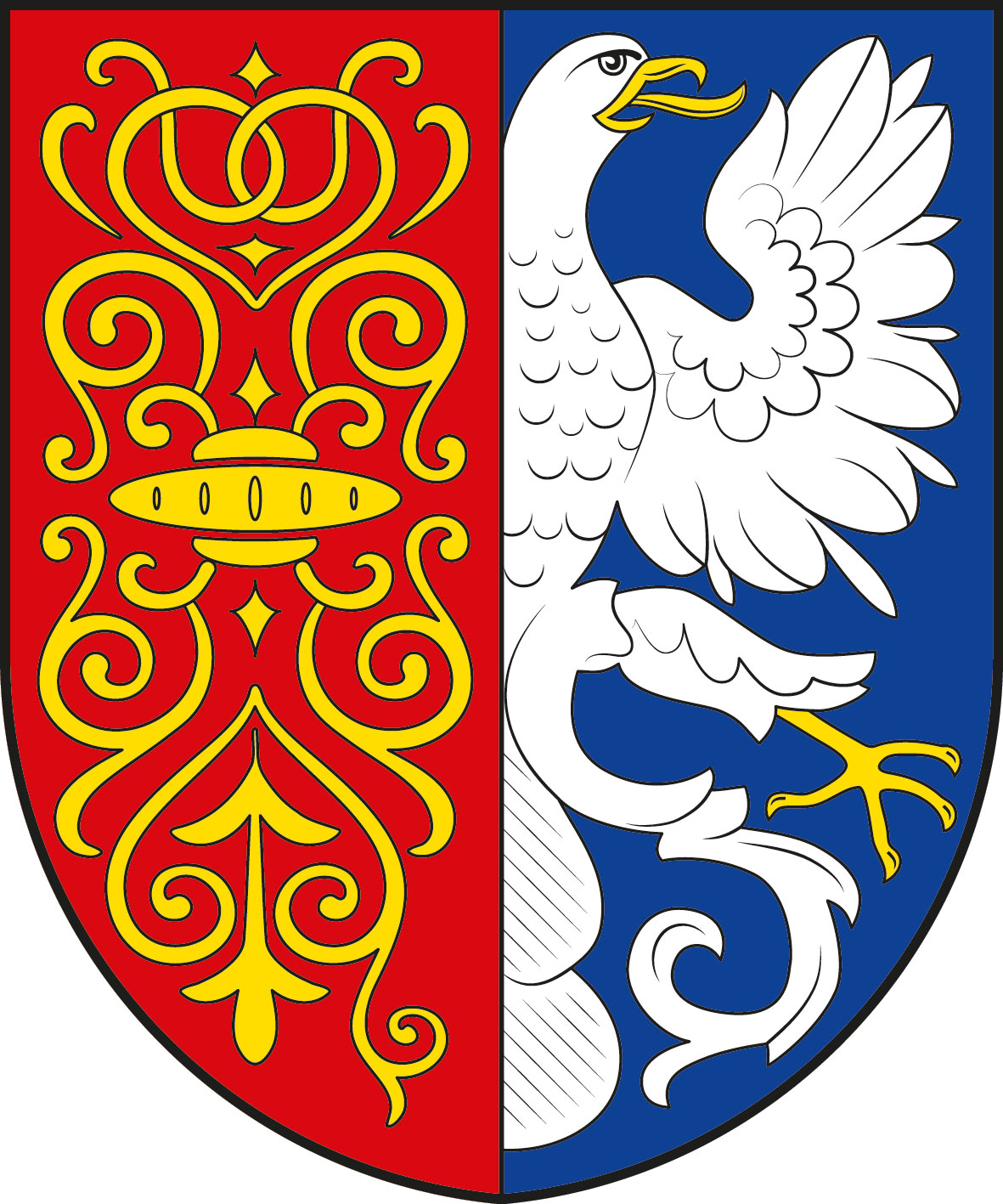 Oficiální znak města Březová nad Svitavou PSP ČR, Podvýborem pro heraldiku a vexilologii, zapsán v Registu komunálních symbolů